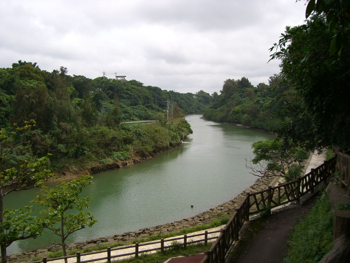 Hijagawa river in Kadena Town, Okinawa, Japan.(沖縄県の比謝川。比謝川大橋付近。)